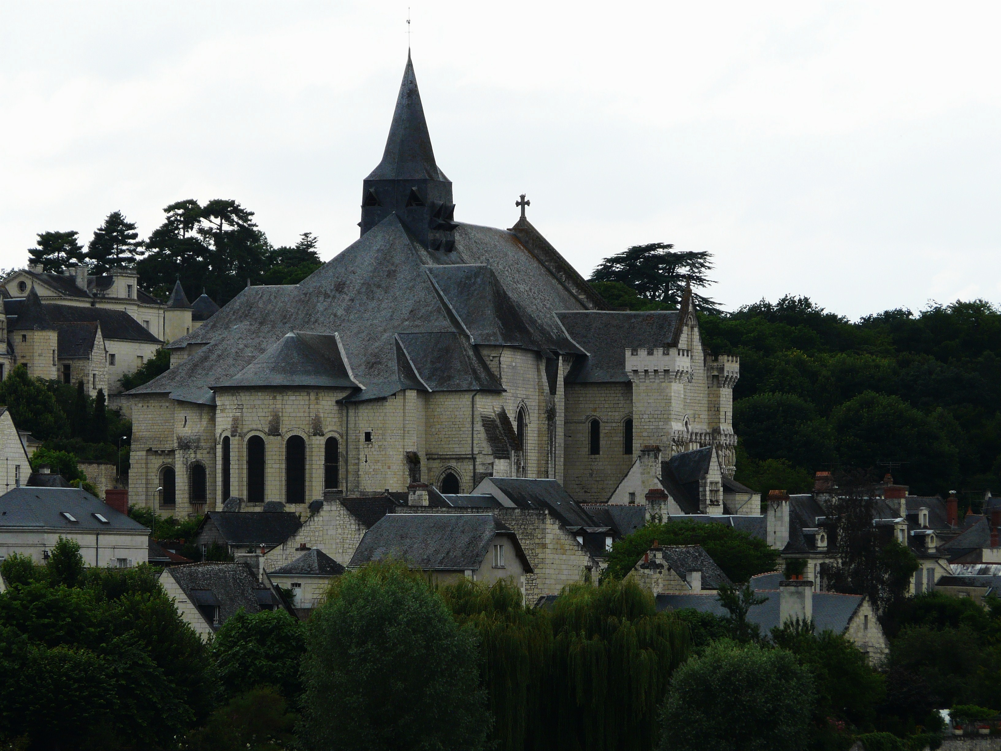 Dominant le village, la collégiale de Candes-Saint-Martin